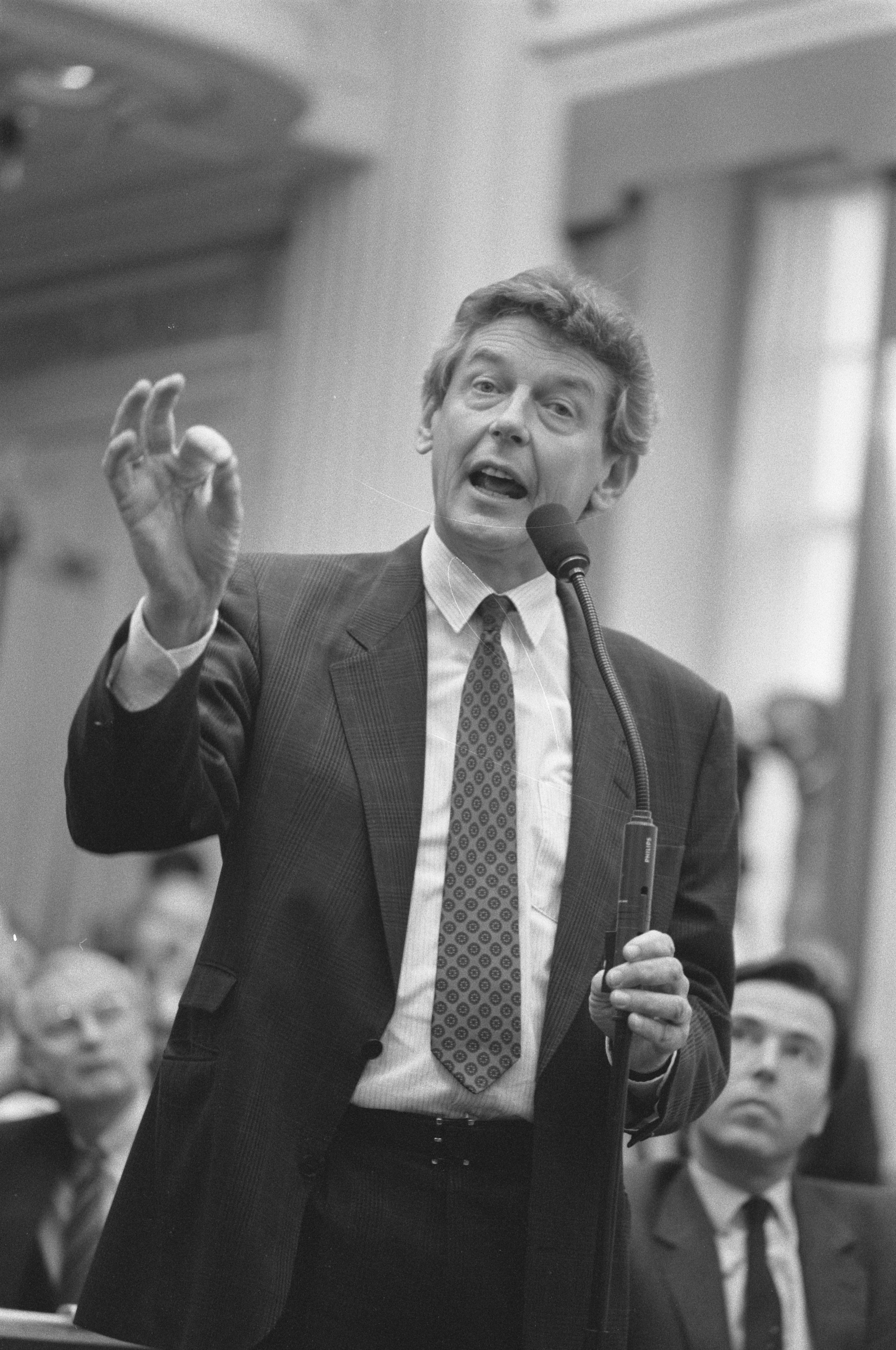 Collectie / Archief : Fotocollectie Anefo Reportage / Serie : [ onbekend ] Beschrijving : Tweede Kamer , algemene beschouwingen; Wim Kok (PvdA) interrumpeert Datum : 11 oktober 1988 Trefwoorden : beschouwingen, politiek Persoonsnaam : Kok, Wim Fotograaf : Bogaerts, Rob / Anefo Auteursrechthebbende : Nationaal Archief Materiaalsoort : Negatief (zwart/wit) Nummer archiefinventaris : bekijk toegang 2.24.01.05 Bestanddeelnummer : 934-3358